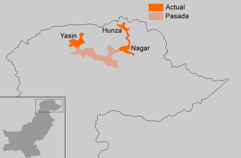 Extensión actual (rojo) y pasada (magenta) de las variedades de burushaski: Dialectos de Hunza, Nagar (buršaski, propiamene dicho) y Yasin (weršikwar). Fuentes: Language map of Pakistan